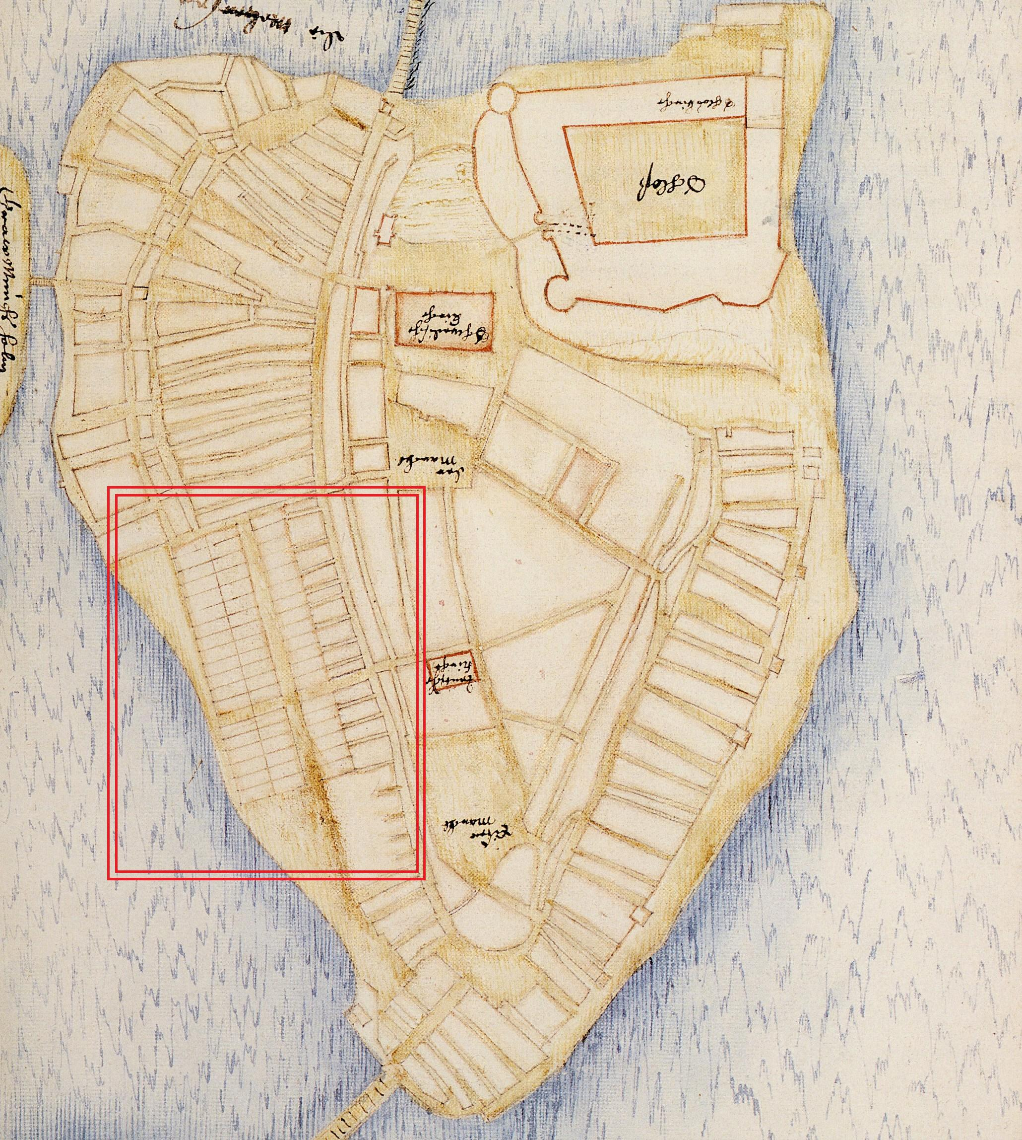 Regleringsplan för sydvästra Stadsholmen (inom röd ram), kartan är vänd med norr uppåt